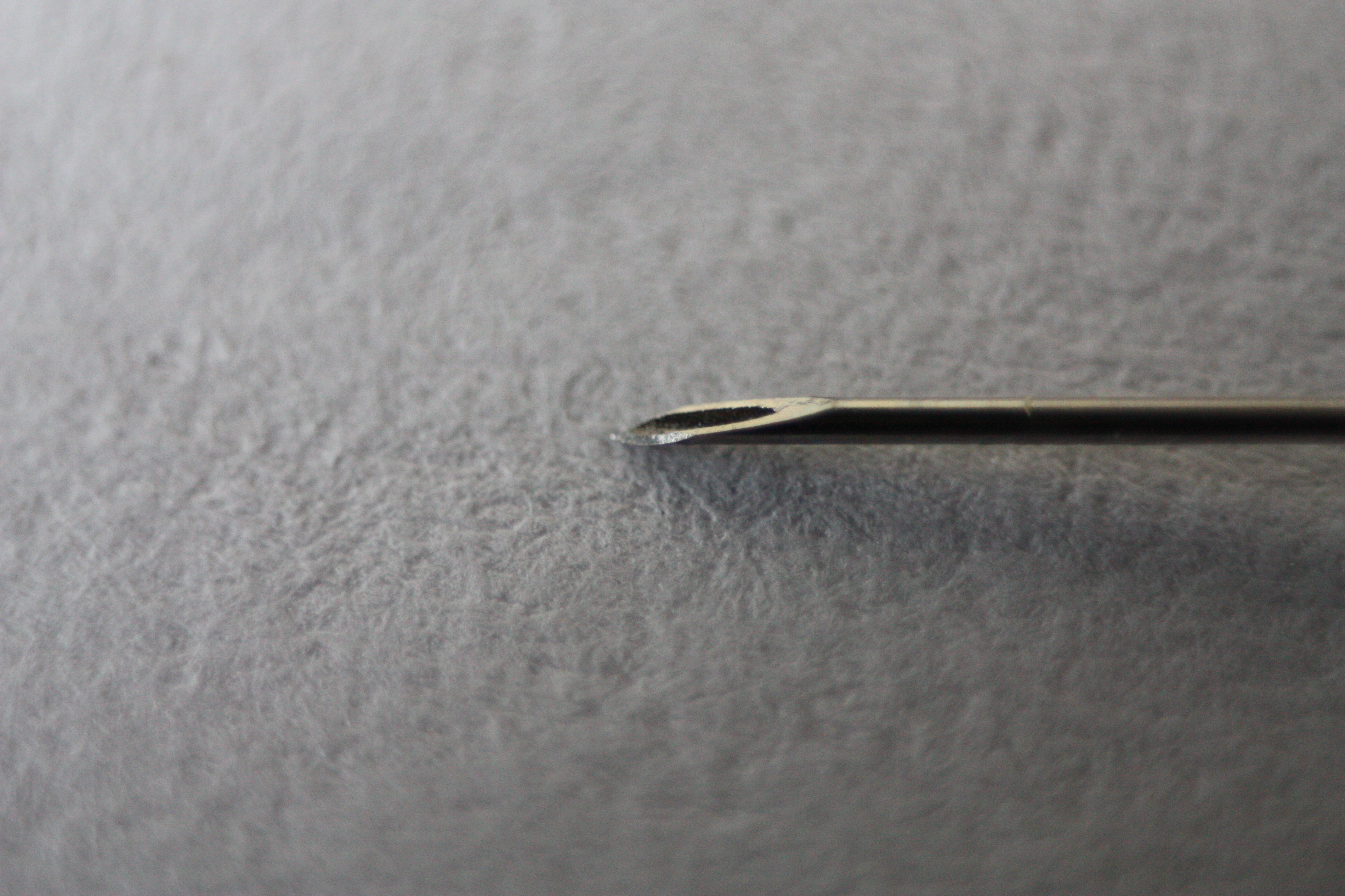 Hypodermic needles, Kanülen, Kanülenspitze, Anschliff